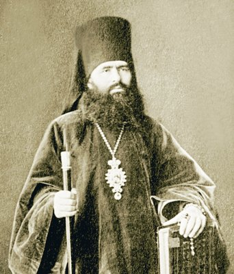 Иоанн (Митропольский), еп. Аксайский. Фотография. Нач. ХХ в. (РГИА)